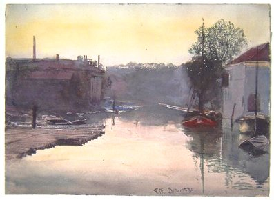 "Dordrecht" von Franz Skarbina (1884)